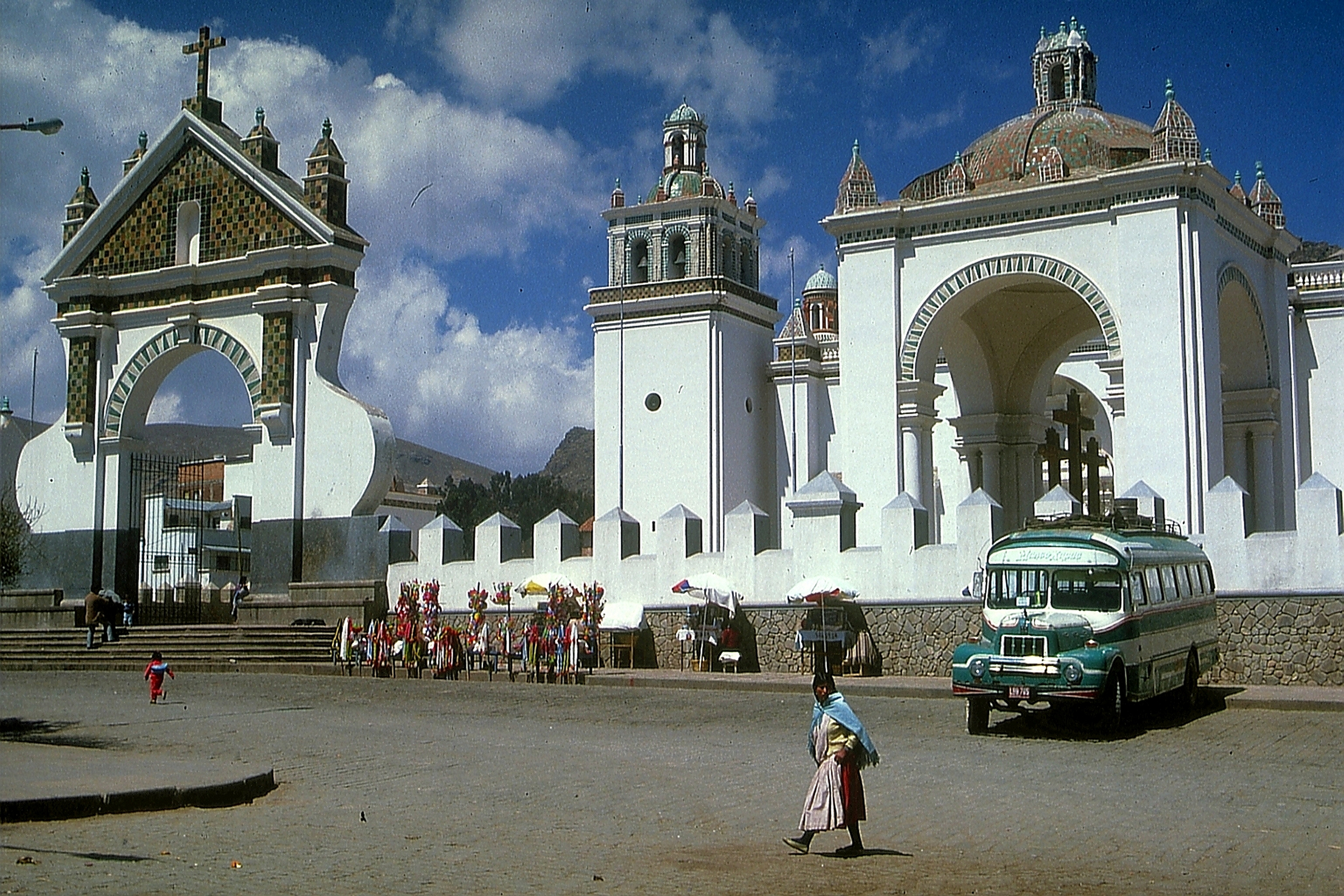 Kathedrale in Copacabana (Titicacasee, Bolivien)